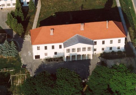 Söjtör, Festetics Mansion, Hungary, aerialphotography